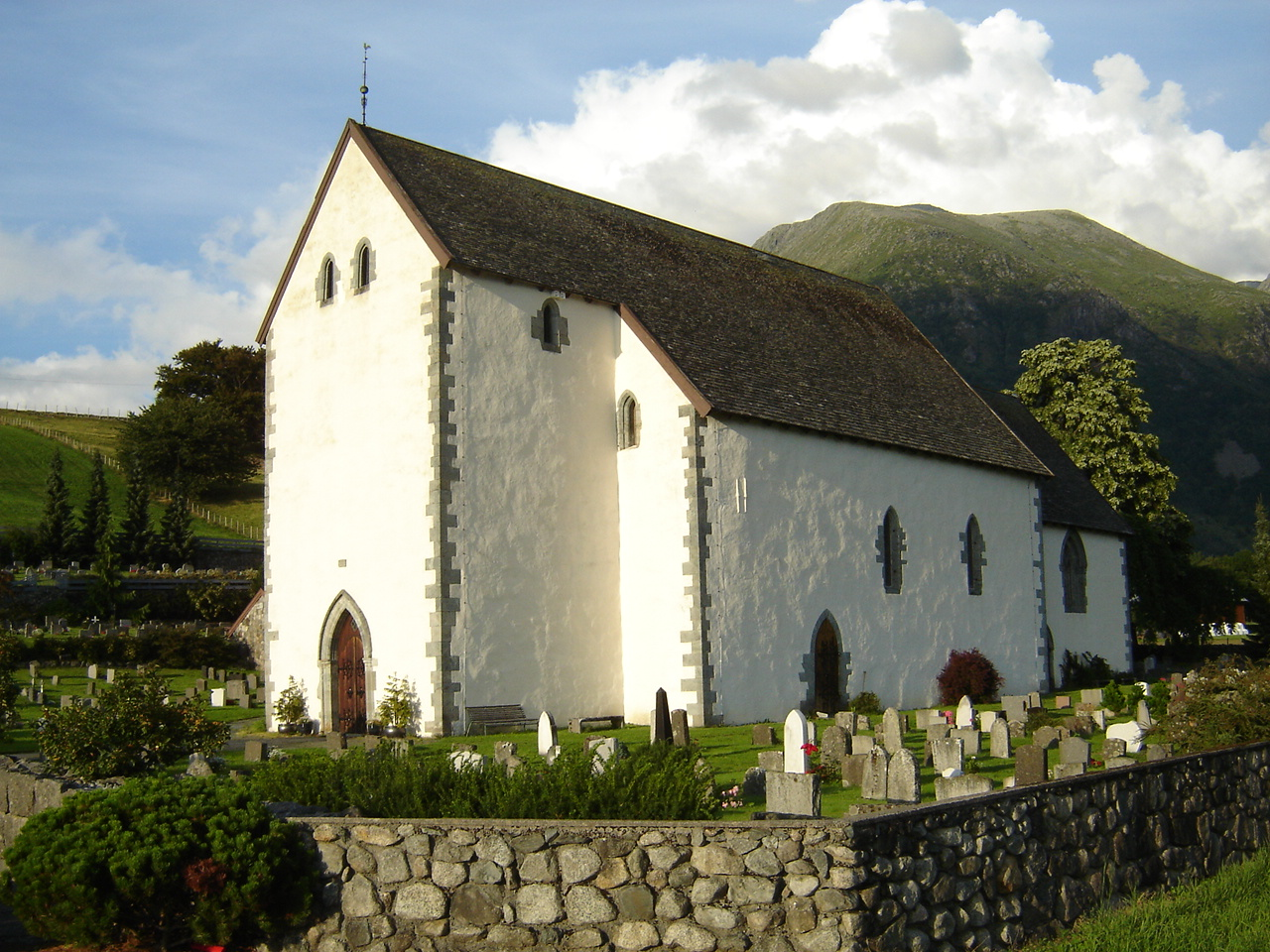 Kvinnherad kirke - stone church, Rosendal, Norway